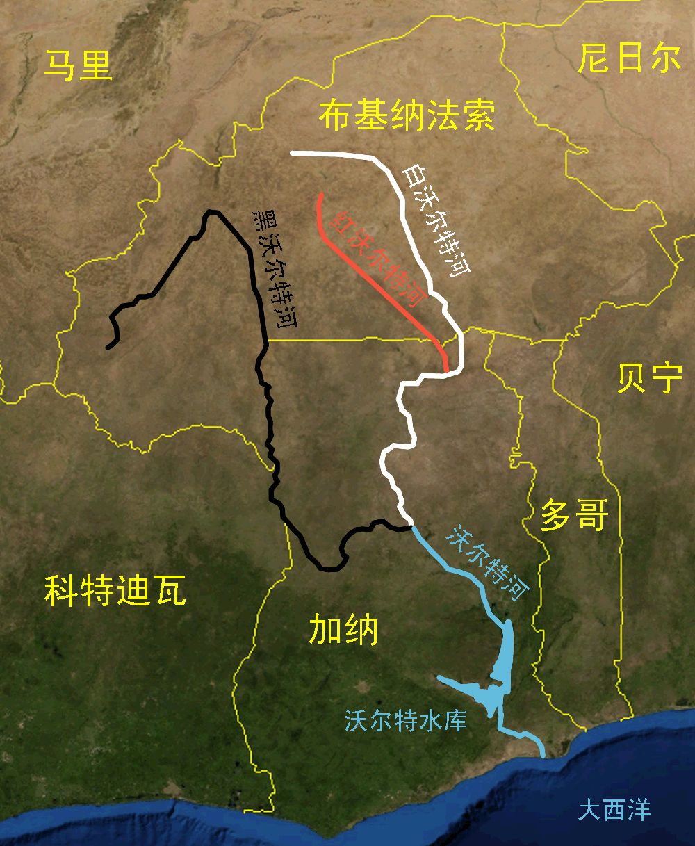 沃尔特河与其三个支流卫星图。